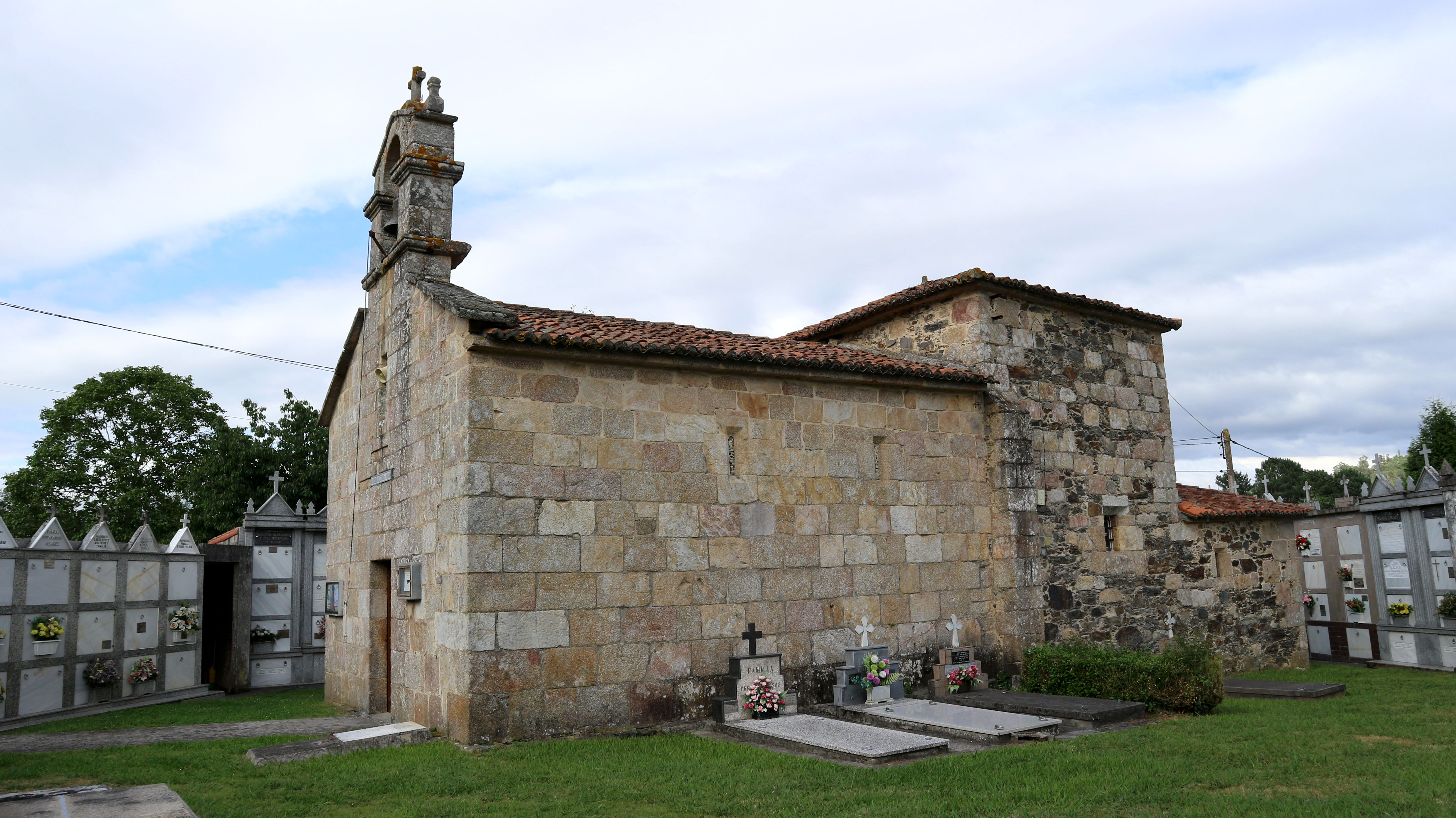 Igrexa de San Estevo de Parada. Parada, Oza-Cesuras.